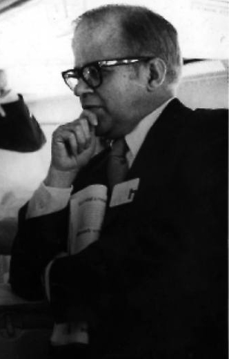 José Maria Navasal, periodista chileno.